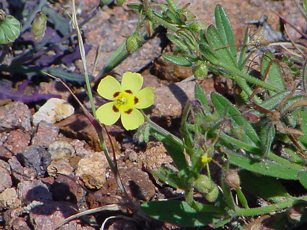 Hélianthème taché (Tuberaria guttata)